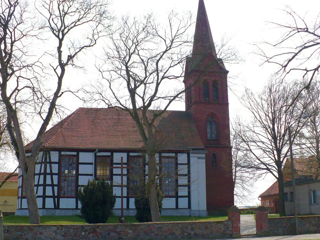 Kościół filialny w Mostkach